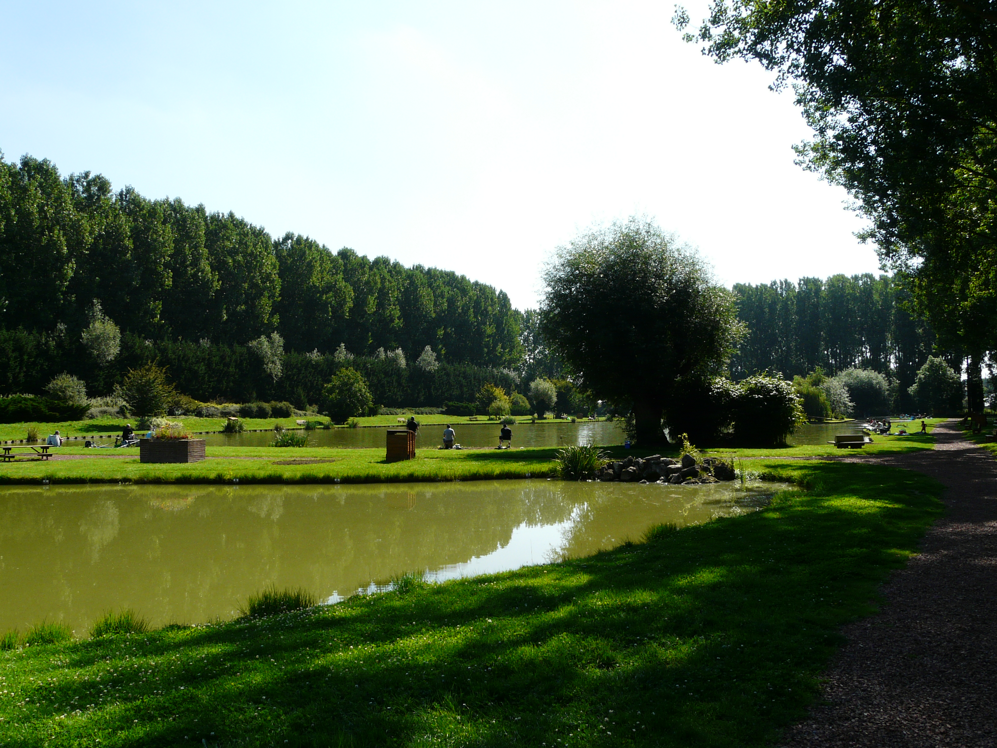 L'étang communal - base de loisirs à Escaudoeuvres, en bordure du canal de l'Escaut